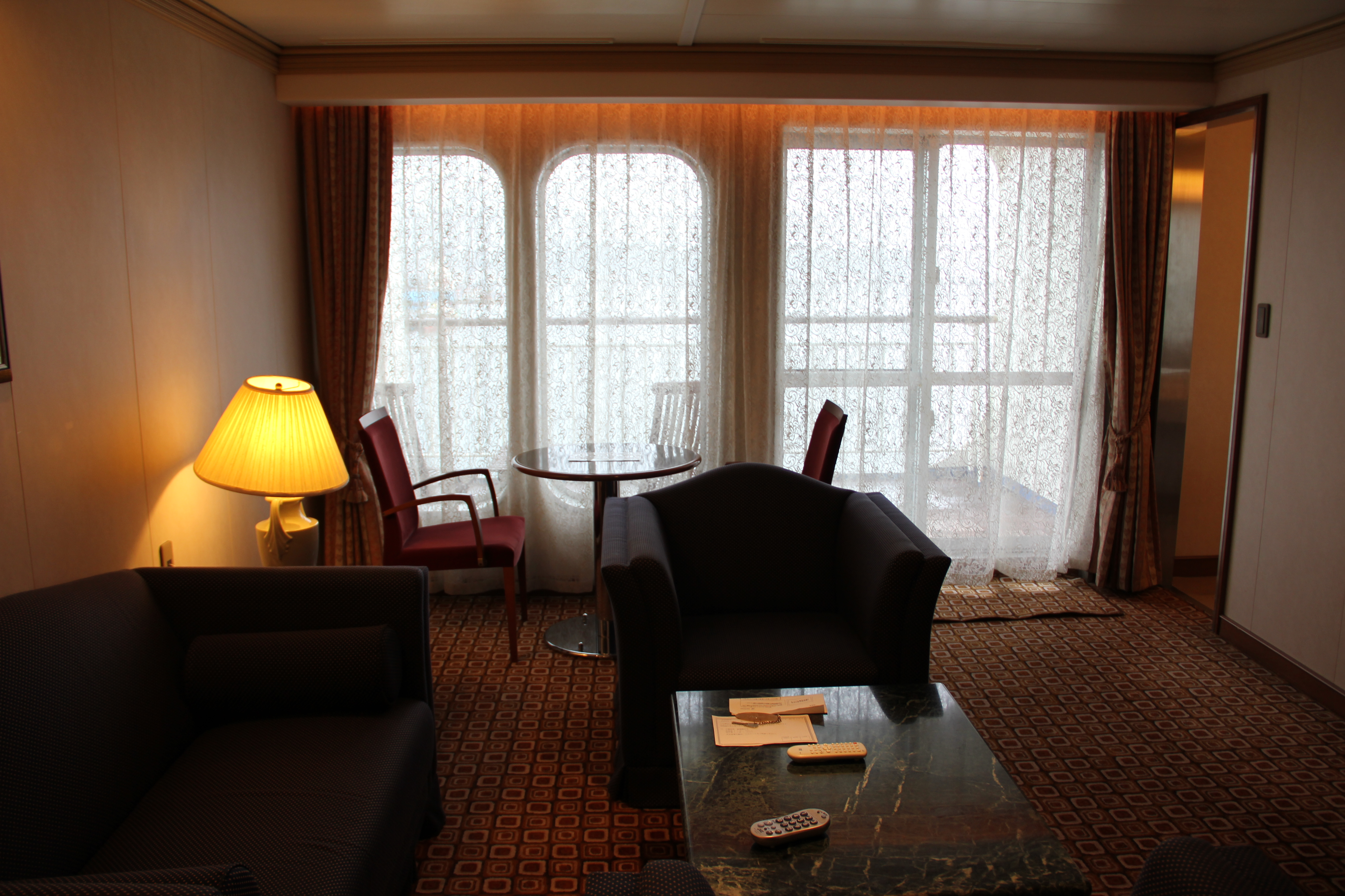 居間部分